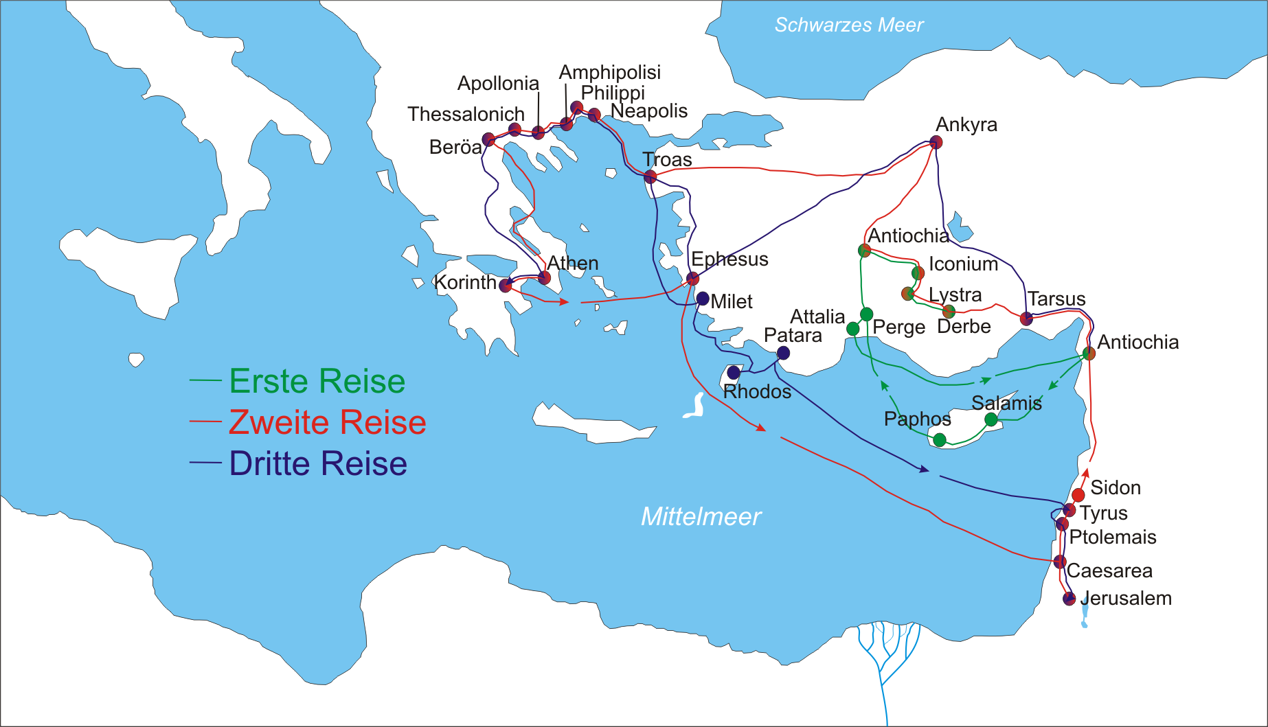 Missionsreisen des Paulus von Tarsus